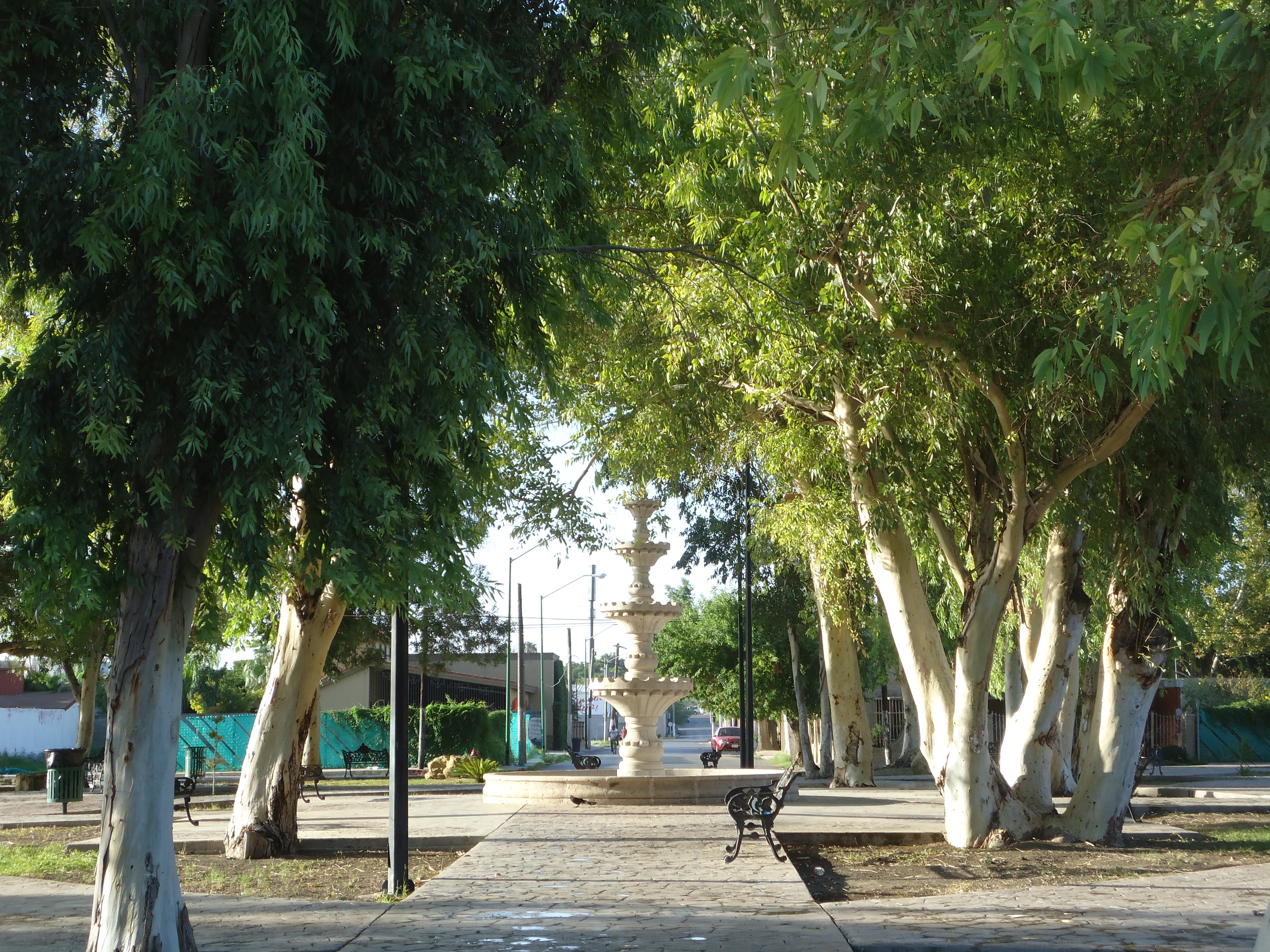 Plaza ubicada en la Colonia Nísperos, en la calle Tepic.